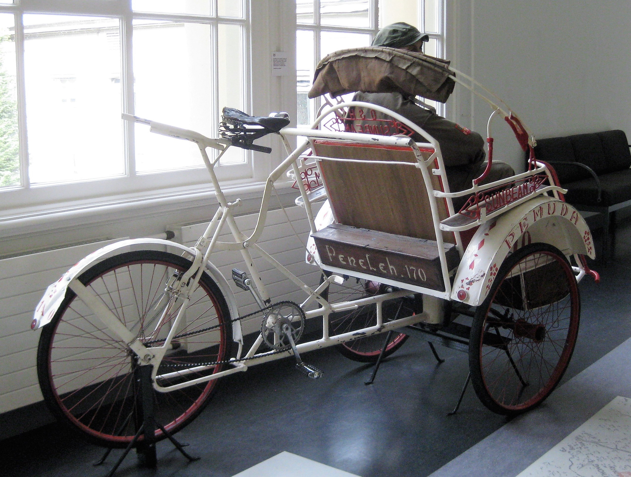 Betjak, in 1971 uit Indonesië naar Museum Bronbeek in Arnhem overgebracht. De betjak werd namens de Vereniging dragers van de Bronzen Leeuw, het Bronzen Kruis en het Veteranen Legioen aangeboden aan het Museum.